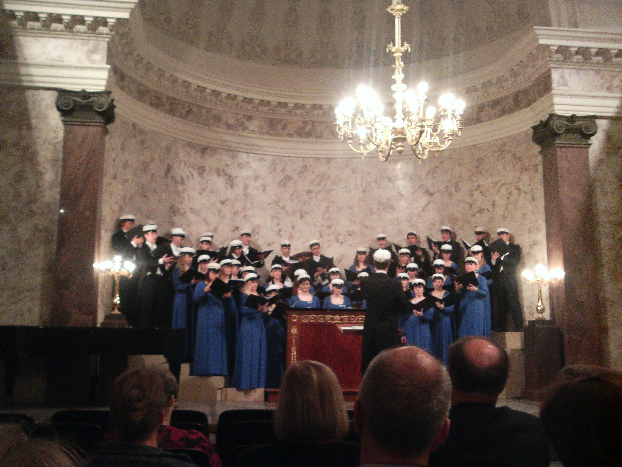 Esiinnyimme Cantus Mercurialiksen kanssa ensin, ja kuvassa laulava TYYn kuoro heitti oman settinsä väliajan jälkeen. Todella upeaa laulantaa. Akatemiantalon akustiikka on niin hieno, että siellä kuulee pienimmätkin äänet ja TYYn kuoro osasi ottaa siitä kaiken irti. Erinomaisen hieno alku tämän vuoden Turun Opiskelijamusiikkifestivaalille!